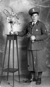 Angelo Pavone (Valguarnera Caropepe, 20 agosto 1916 – Tobruch, 22 gennaio 1941), militare italiano.